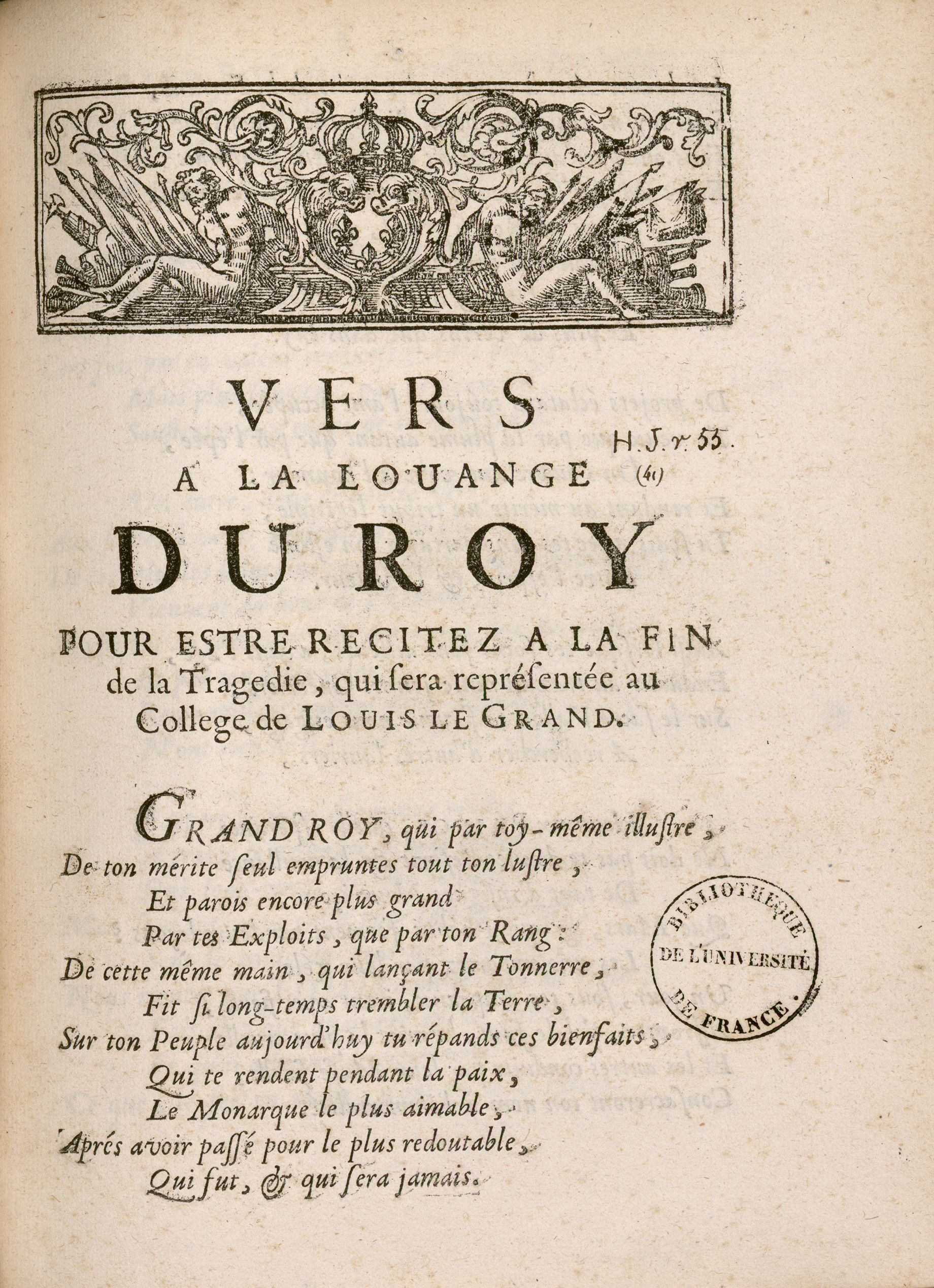 Vers a la louange du roy pour estre recitez a la fin de la tragedie, qui sera représentée au college de Louis le Grand